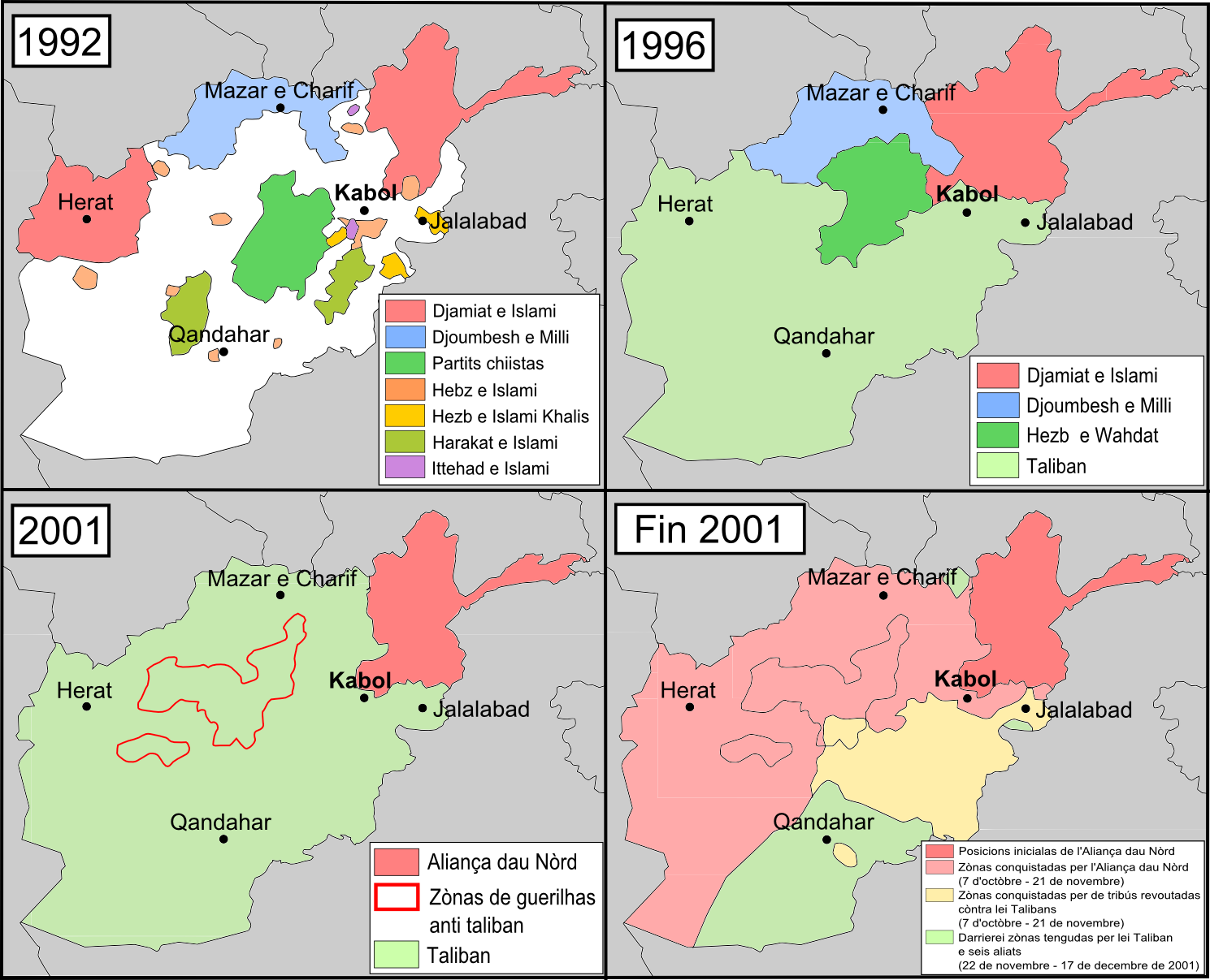 Esquèma generau de la Guèrra d'Afganistan (1992-2001).